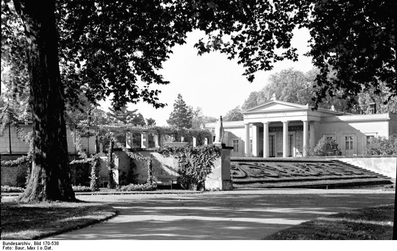 Potsdam.- Sanssouci, Schloß Charlottenhof